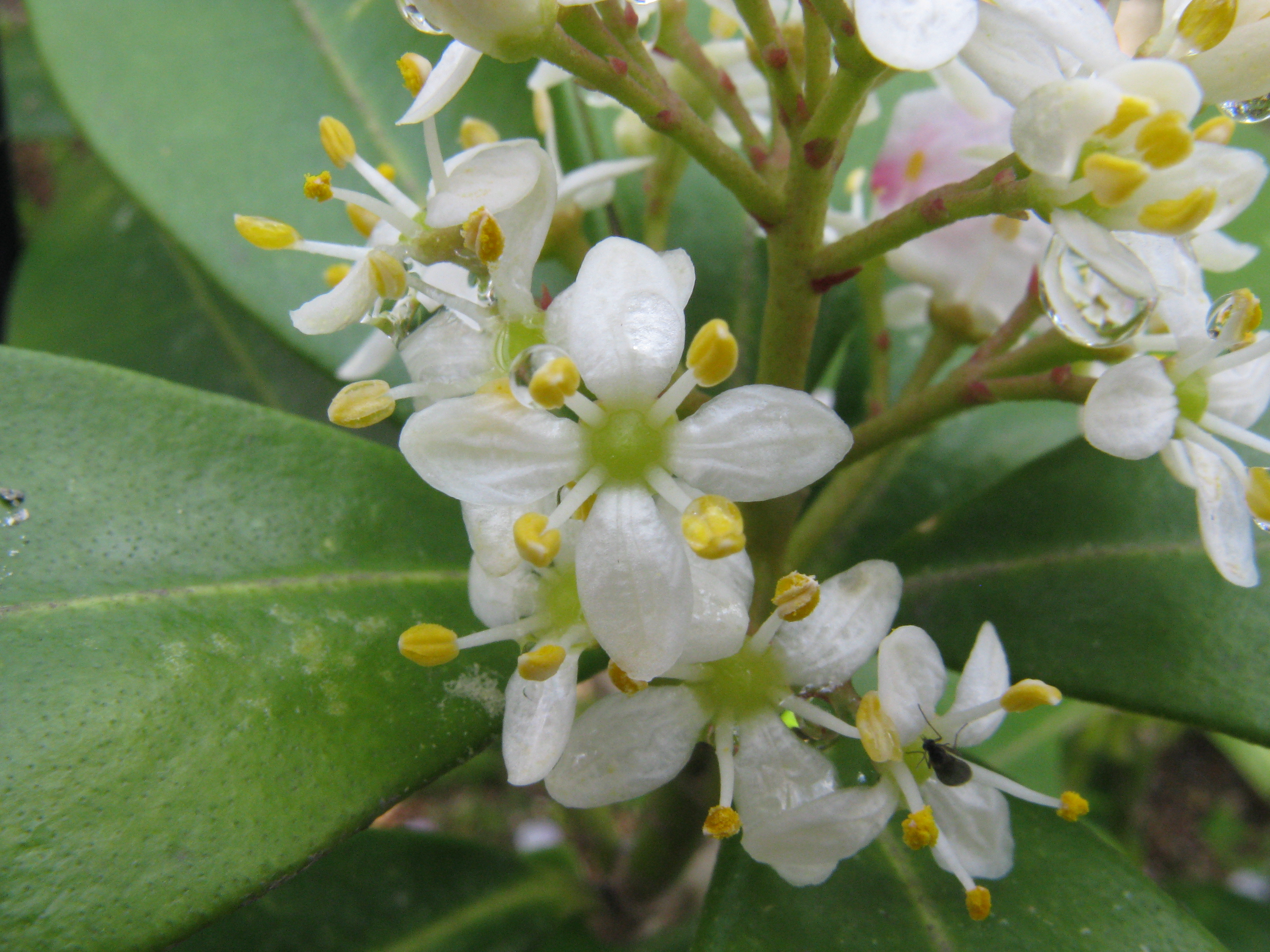 Scientific name Skimmia japonica